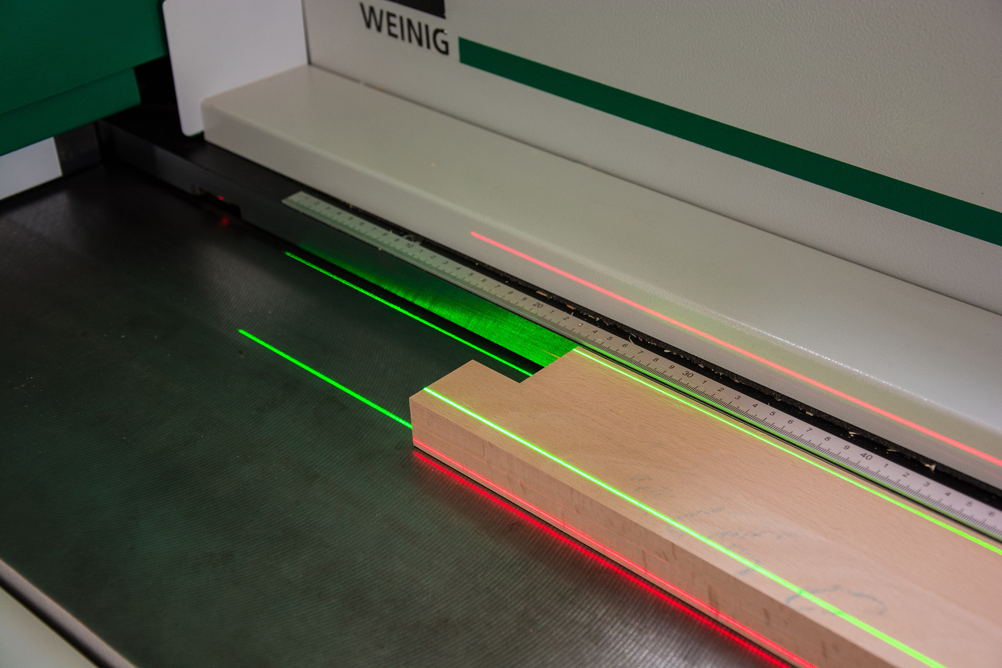 Hobelmaschine Weinig Cube Detail Laserstrahlen